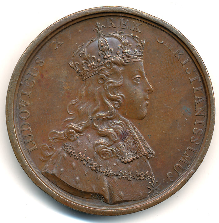 Louis XV, Couronnement 1722, avers de la médaille par Michel Rög, 41mm, bronze